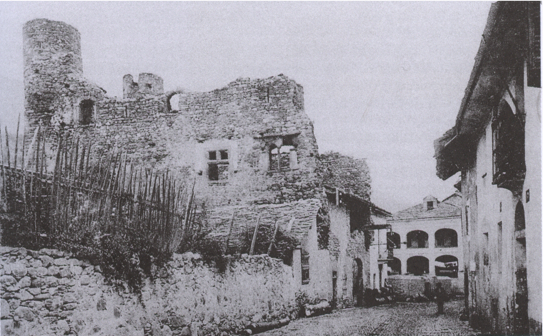 Il Castello di Pilato nel 1924. Si noti che è ancora conservata parte della facciata sulla strada. Nus, Valle d'Aosta, Italia. (BREL, Fonds Domaine)